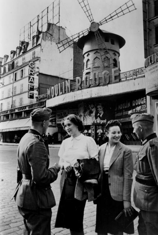 Title: Paris, deutsche Soldaten vor dem Moulin Rouge Extra information: Frankreich, Paris.- Zwei deutsche Soldaten mit zwei Frauen vor dem Moulin Rouge stehend; PK 689 Factual corrections and alternative descriptions are encouraged separately from the original description. Additionally errors can be reported at this page to inform the Bundesarchiv. Original historic description: Scherl: Beim Bummel durch Paris. - Deutsche Soldaten fragen ein paar junge Mädels nach dem Weg. PK - Boesig - Scherl Bilderdienst 8020-40 "Fr." OKW Juni 1940